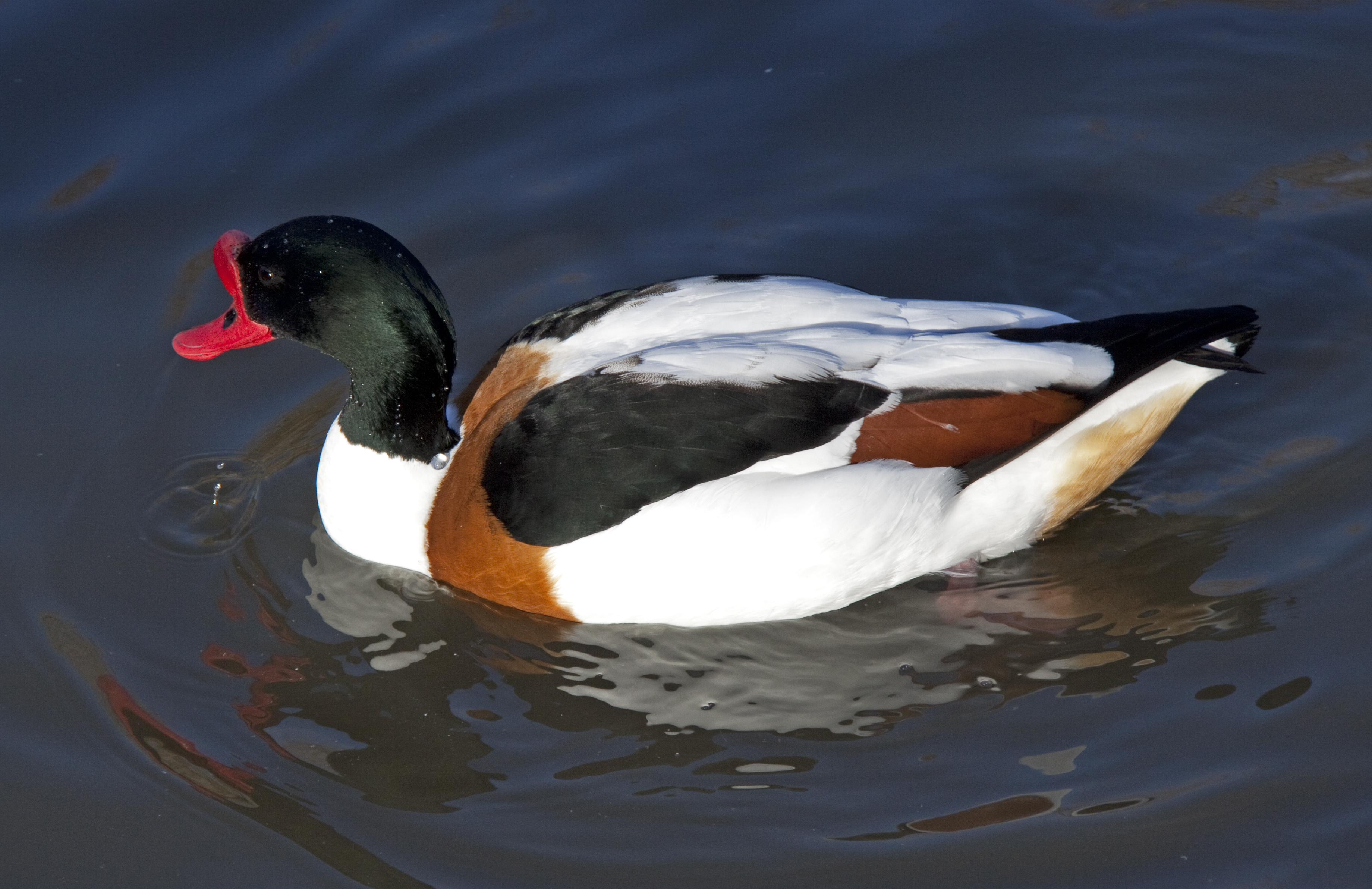 Tadorna tadorna